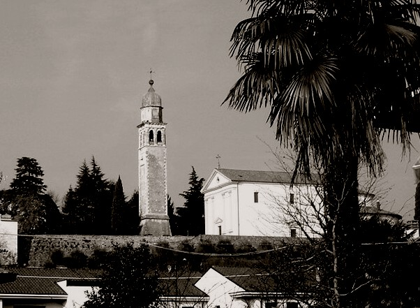 Colle Umberto (Treviso, Italia): parrocchiale di San Tommaso e relativo campanile.